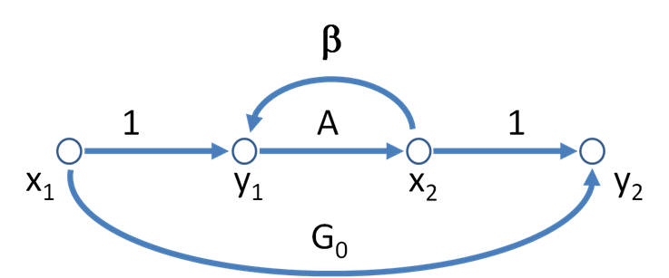 Control parameter SFG